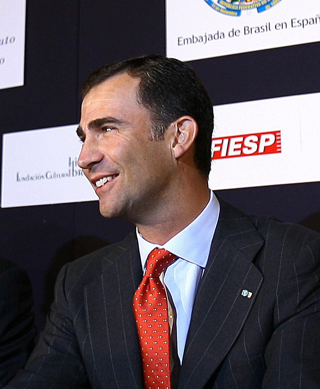 Príncipe Filipe de Bourbon e Grécia, antes da abertura do seminário empresarial Perspectivas da Economia Brasileira: Programa de Aceleração do Crescimento e Biocombustíveis.